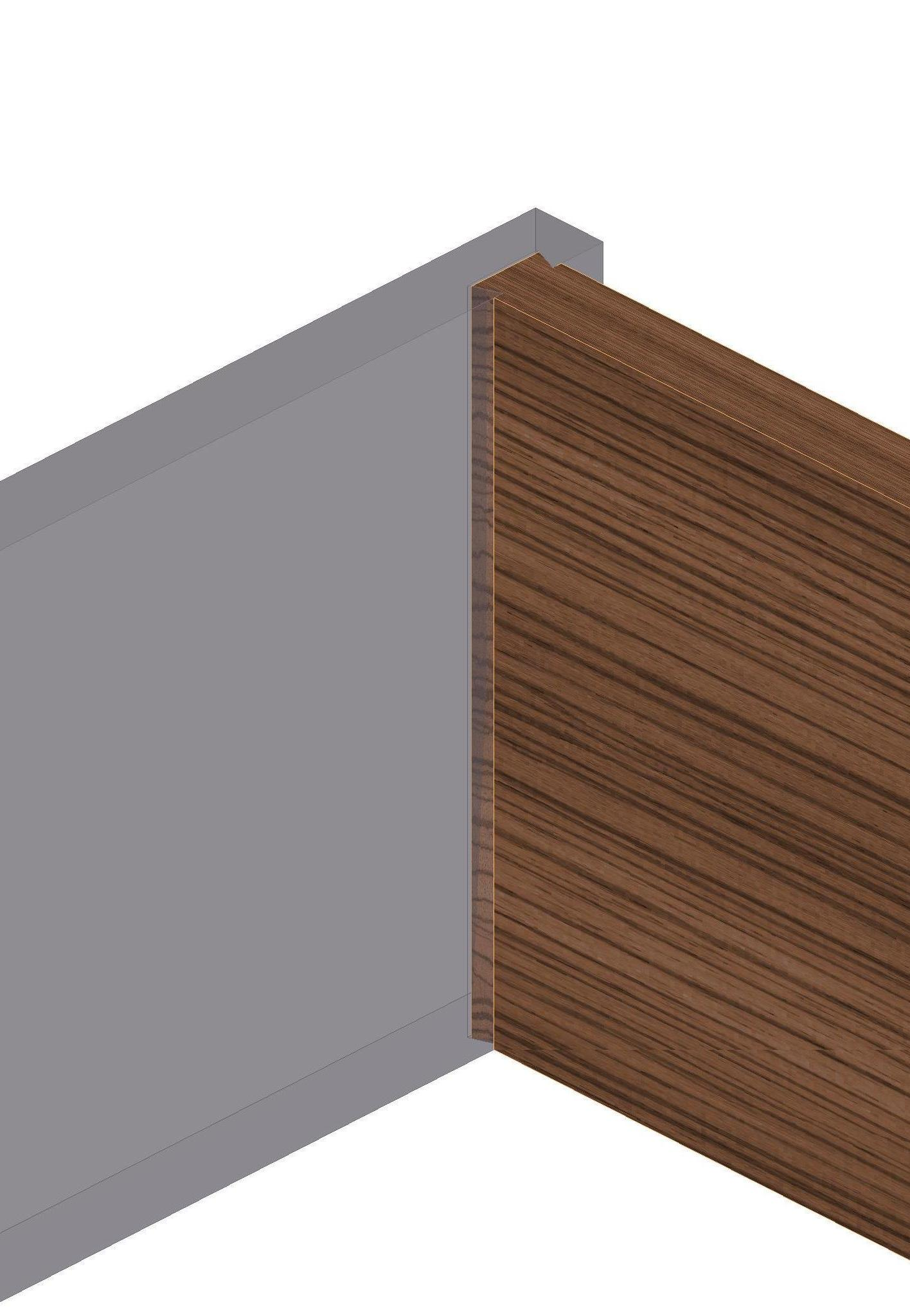 Holz-Breitenverbindungen beidseitige Gratfeder siehe Holzverbindung.